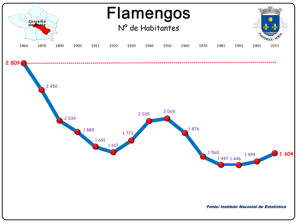 População